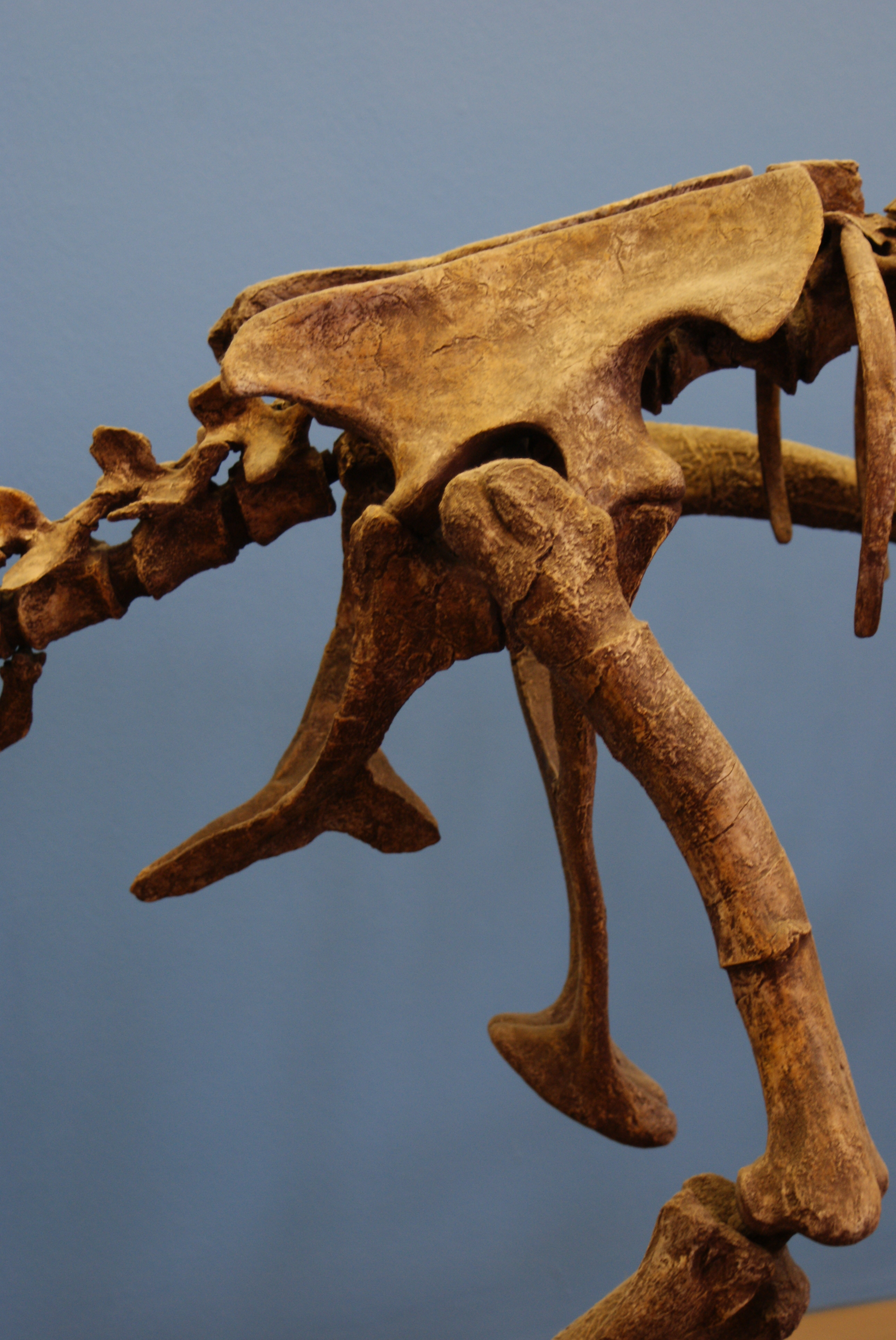 Falcarius utahensis, pelvic girdle